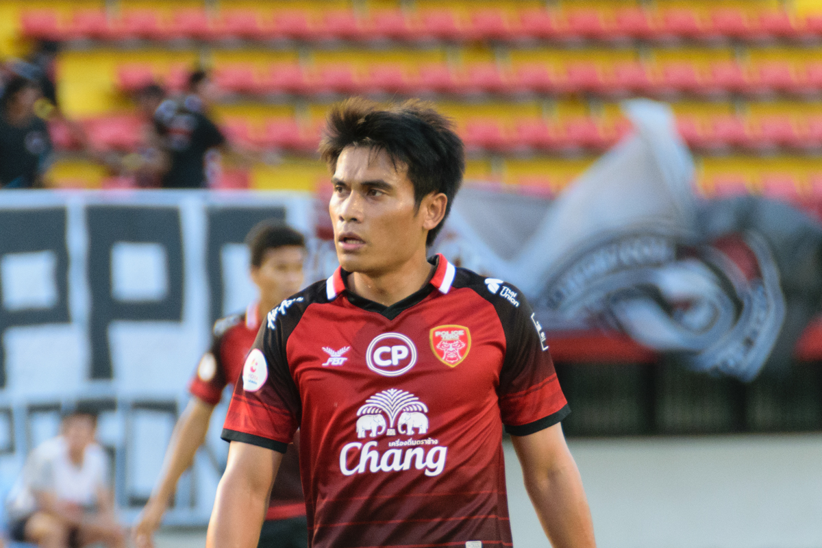 Chompon Buangam